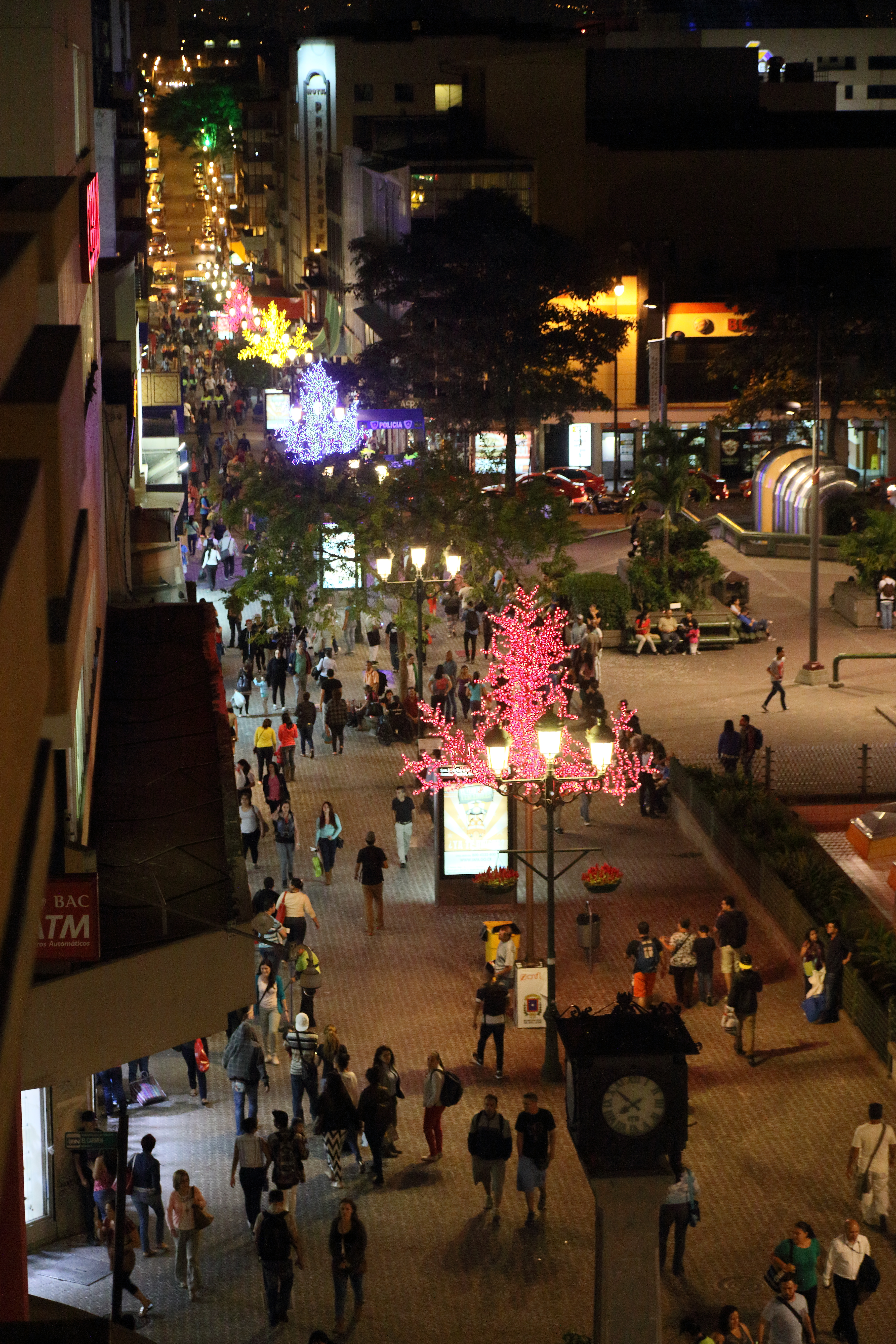 Avenue centrale, San José, Costa Rica.